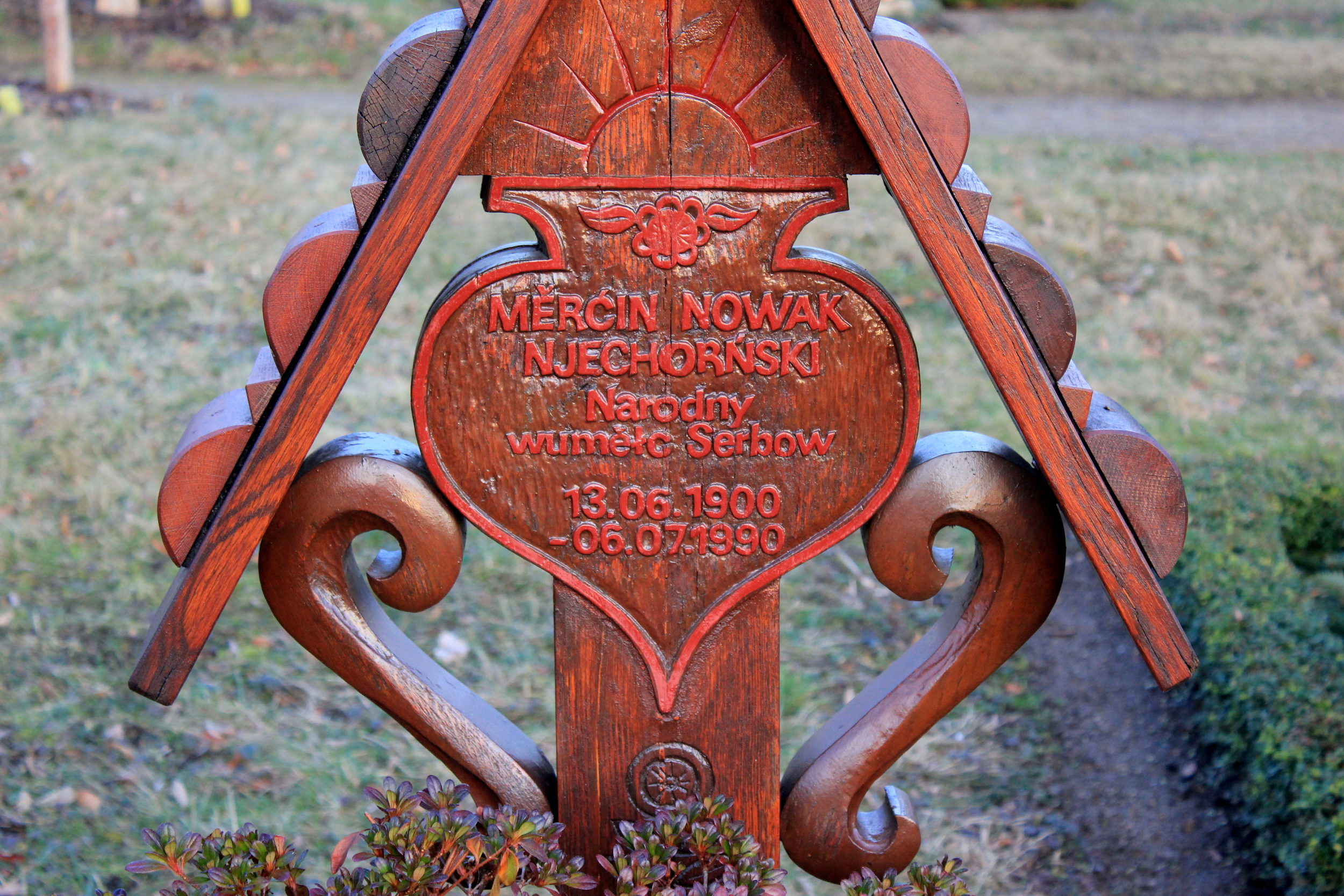 Hornjoserbsce: Narowny křiž Měrćina Nowaka-Njechorńskeho na kěrchowje w Hrodźišću.